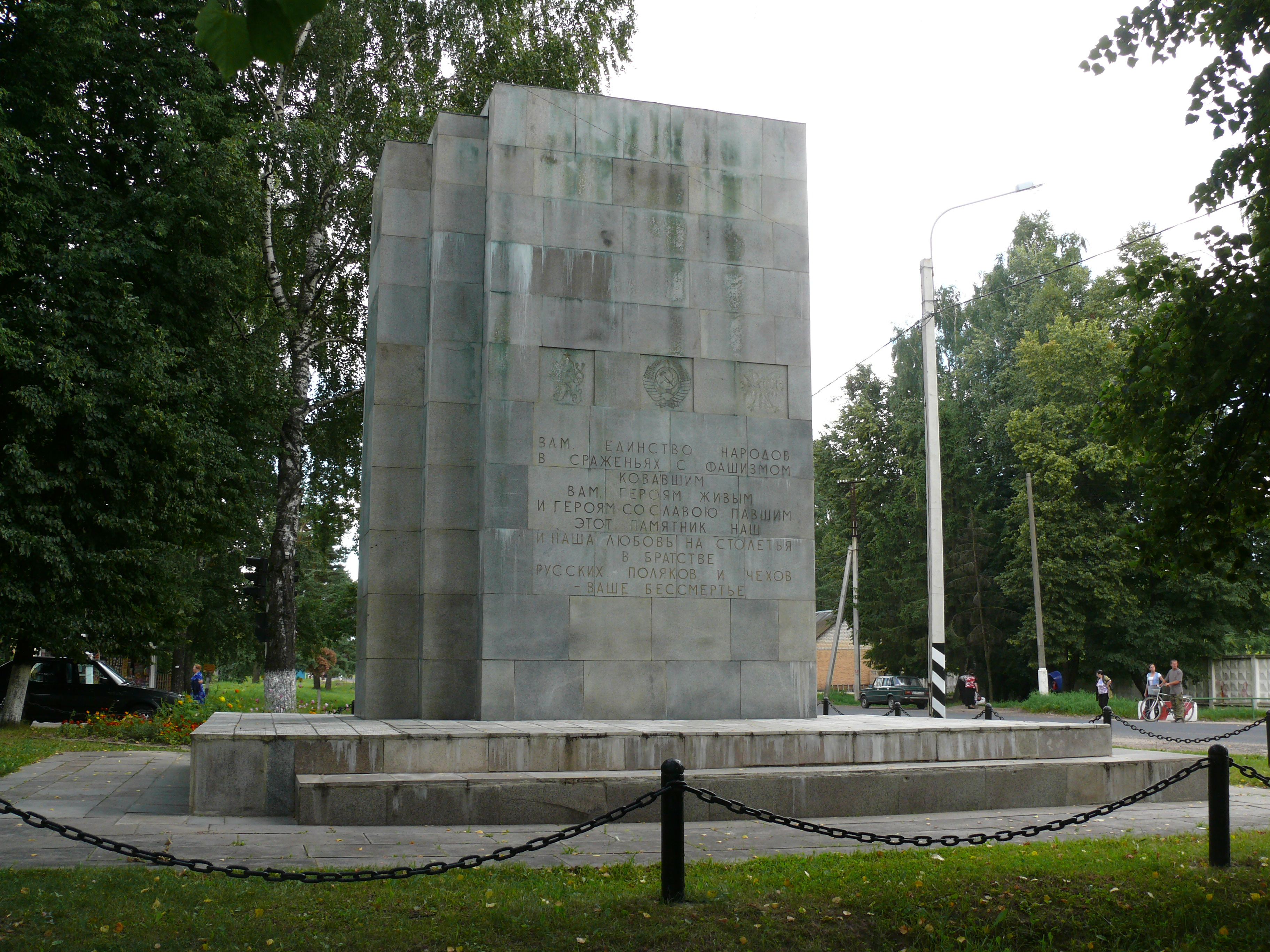 Памятник советско-польско-чехословацкому подполью: Сеща, Дубровский район, Брянская область